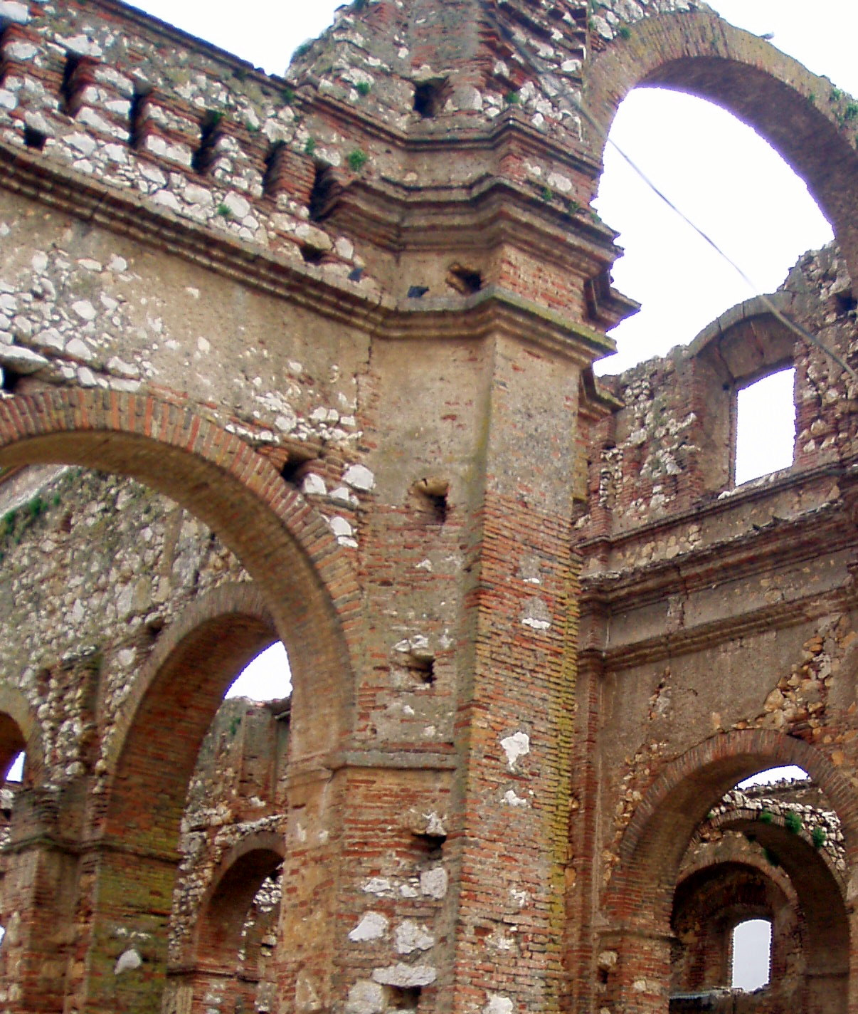 Ruinas de la antigua iglesia de Zafarraya.